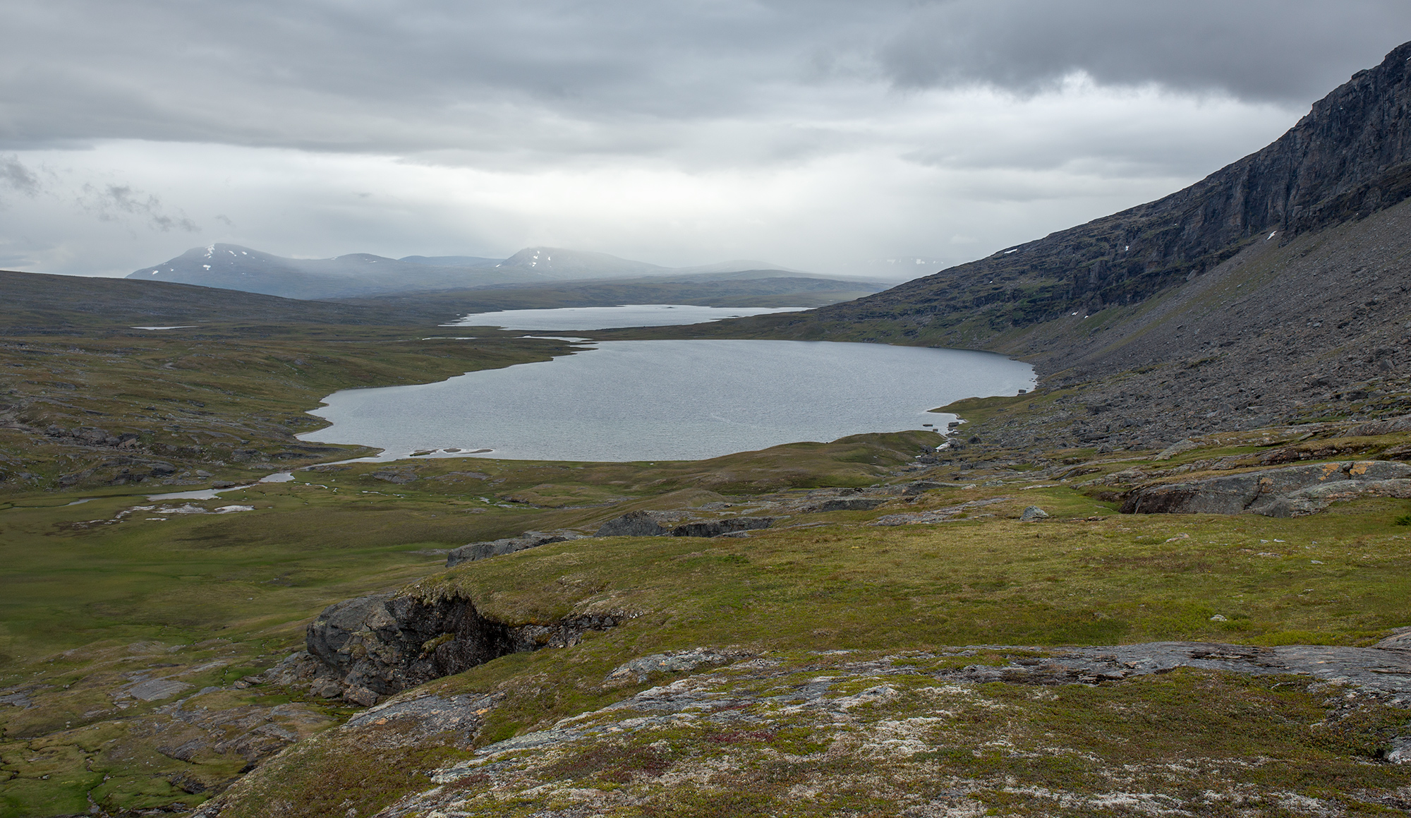 Rähtjátjávrre och längre bort Gálbejávrre. Vy från väster.